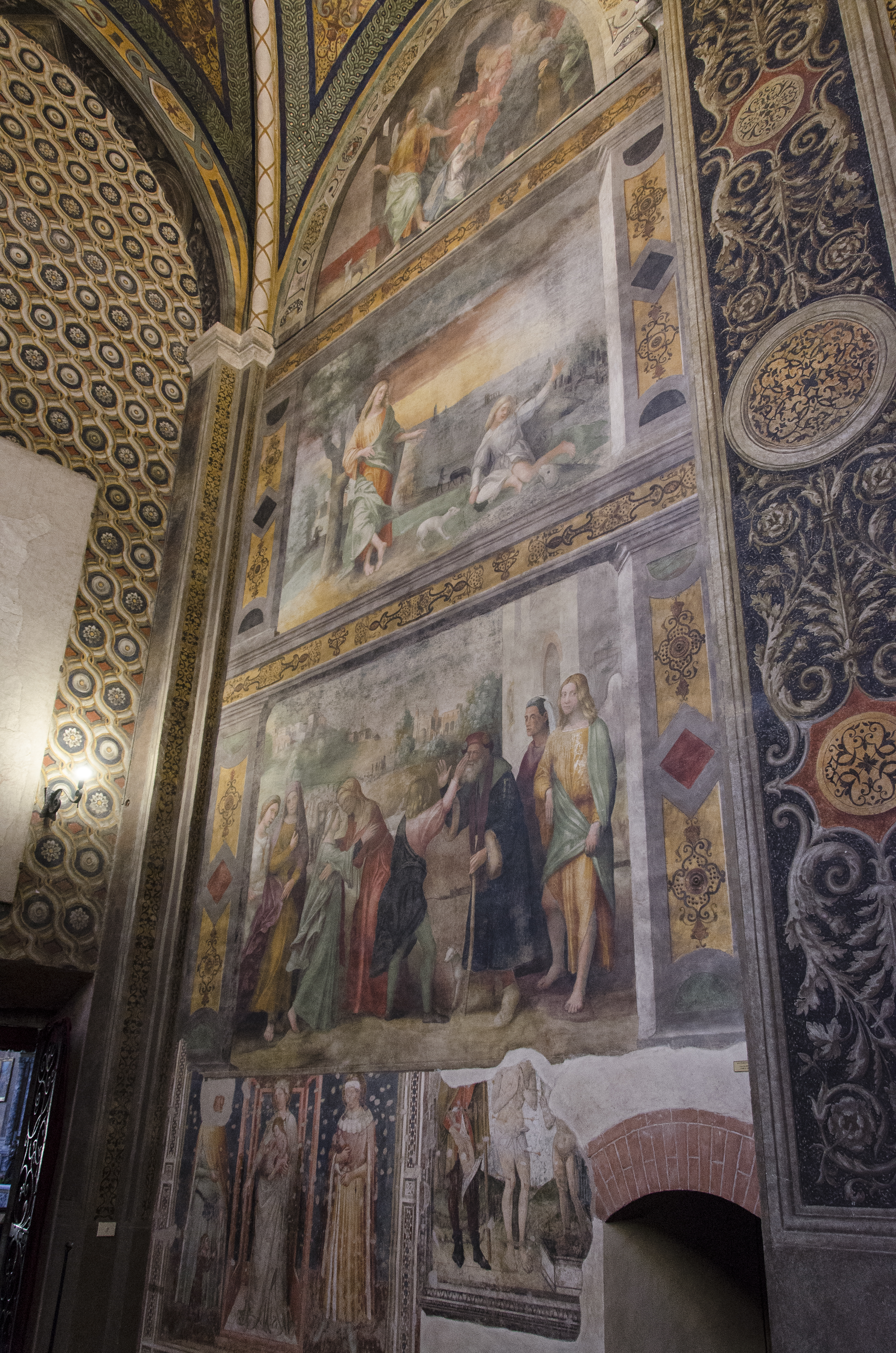 Chiesa di Sant'Eufemia - cappella Spolverini Dal Verme